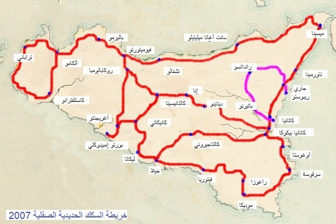 تصنيف:خرائط إيطاليا بالعربية